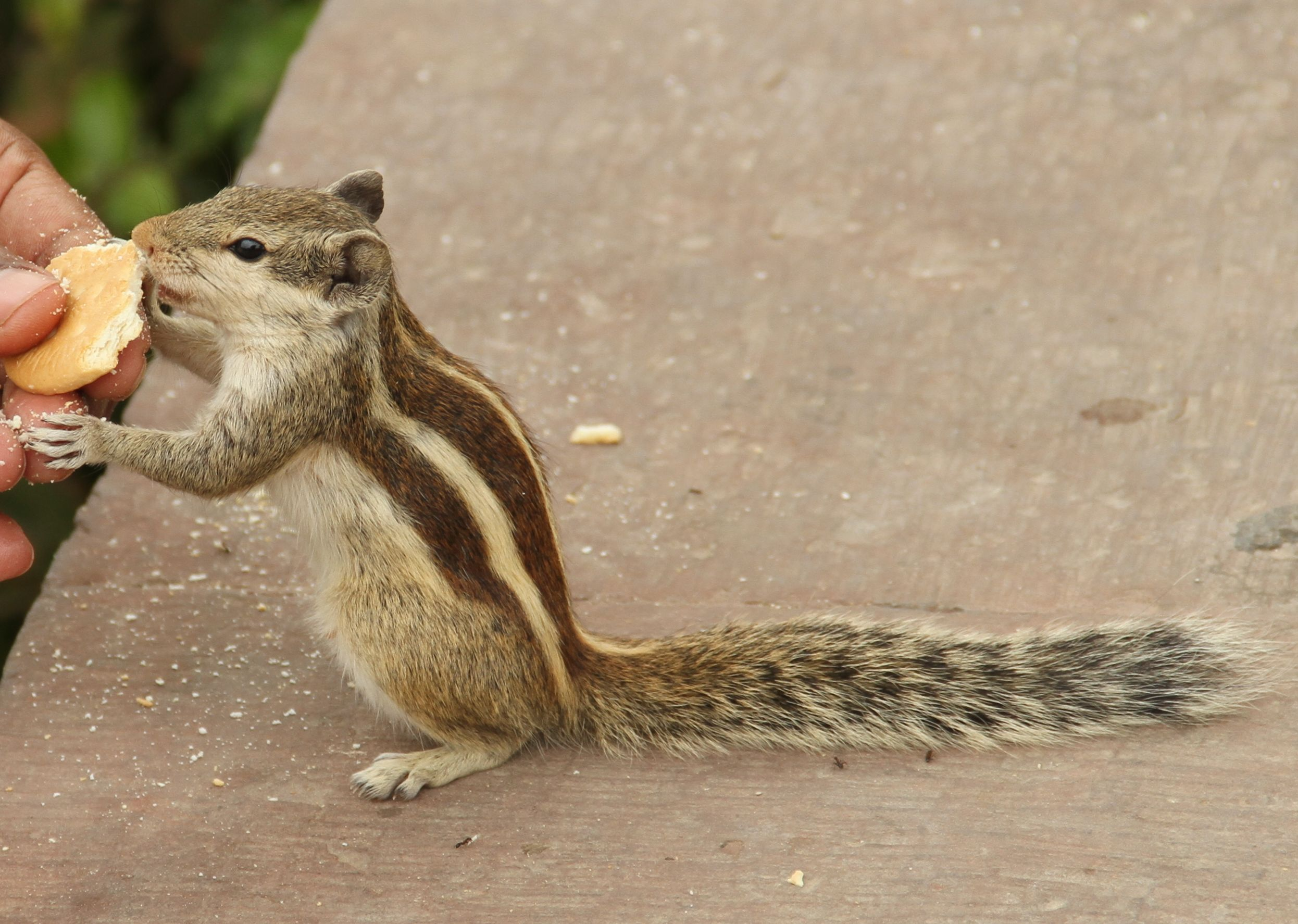 Индийская пальмовая белка